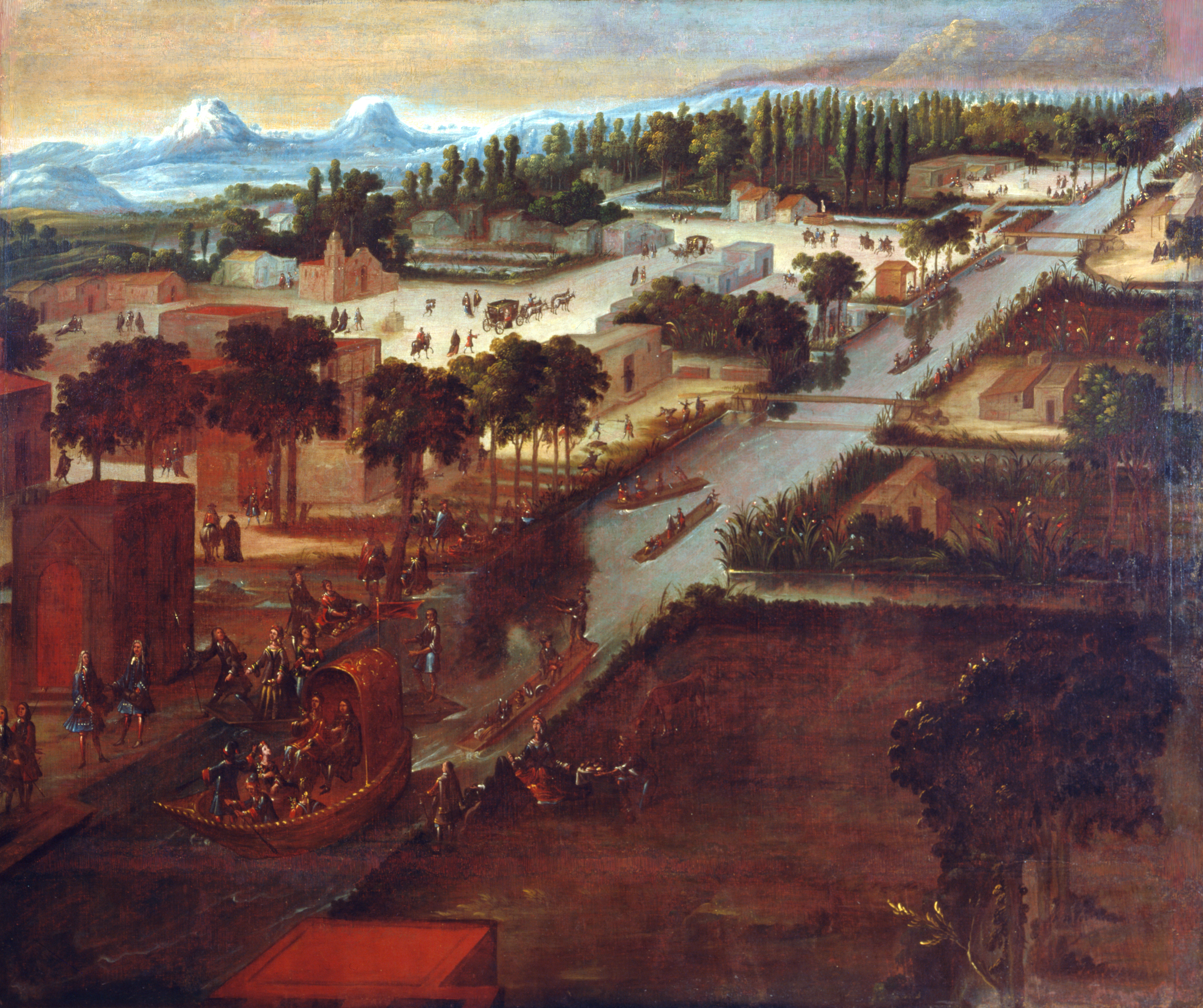 Paseo del virrey don Francisco Fernández de la Cueva y de la Cueva, duque de Alburquerque, y de la virreina Juana de la Cerda por el Canal de la Viga